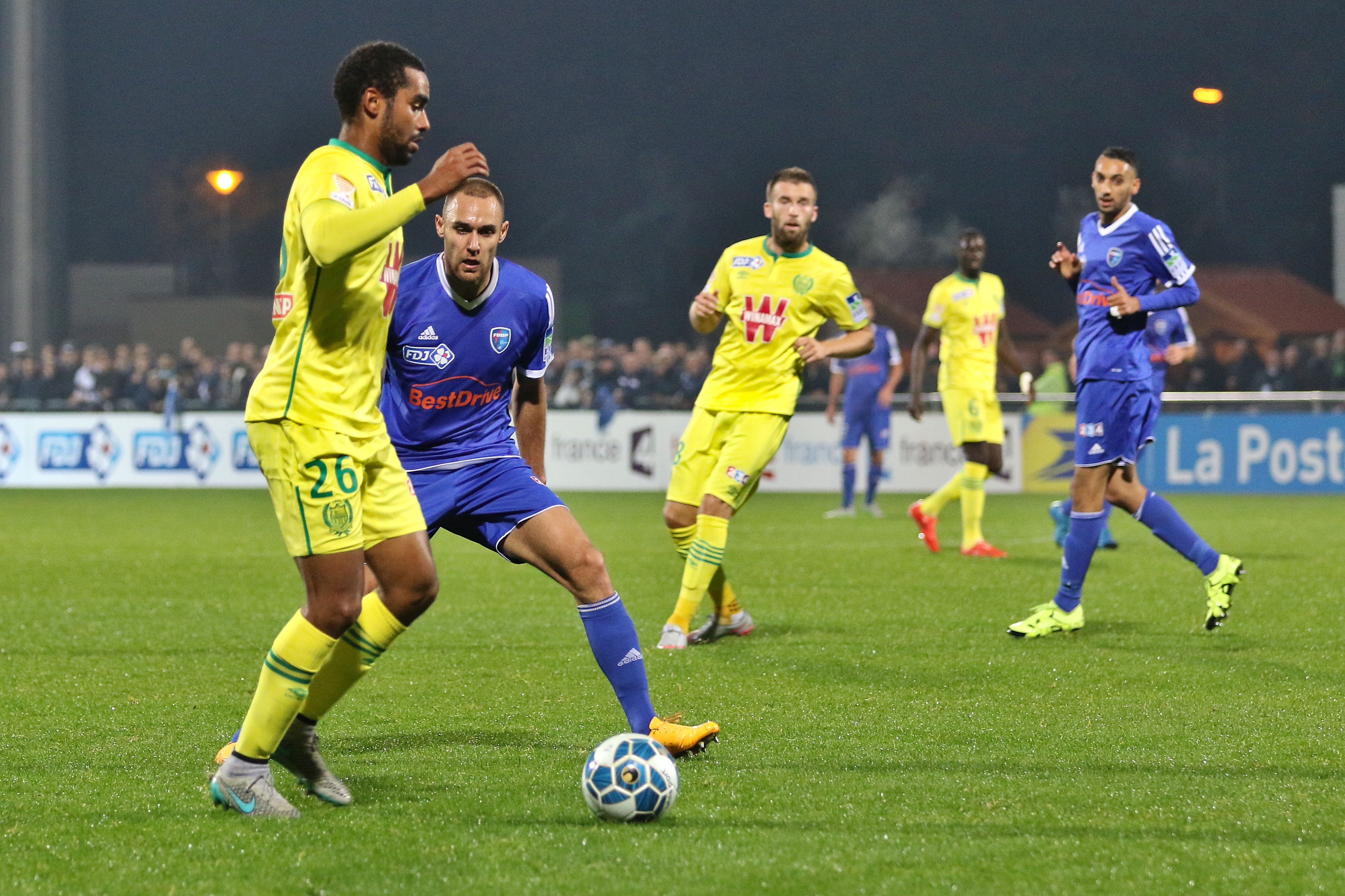 FBBP01 - FCN - 20151028 - Coupe de la Ligue - Koffi Djidji et Jimmy Nirlo